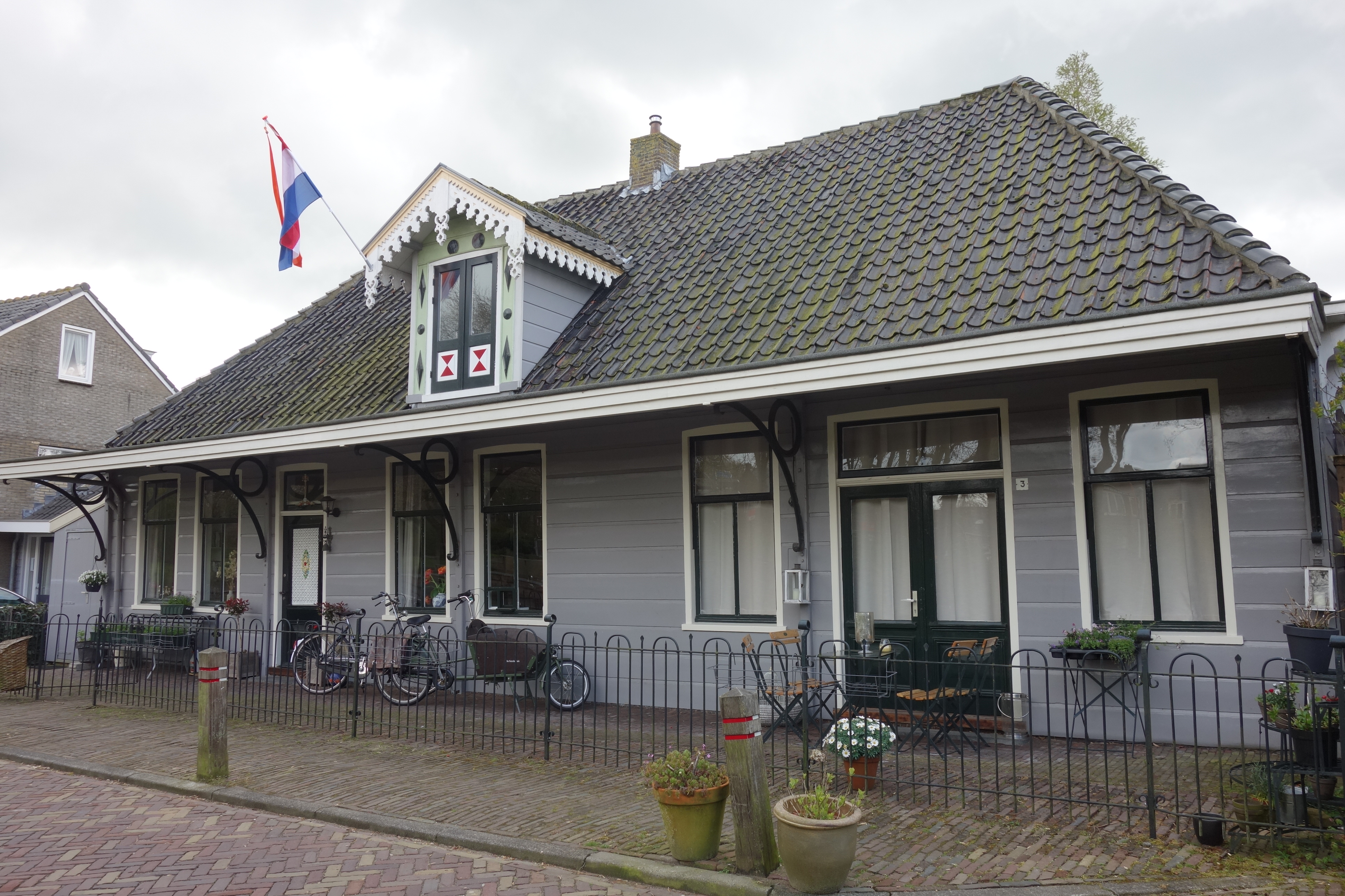 Gemeentelijk monument aan de Dorpsstraat in Broek in Waterland. Het pand is nu een woning, maar is het voormalige tramgebouw van de Waterlandse Tram in Broek in Waterland.